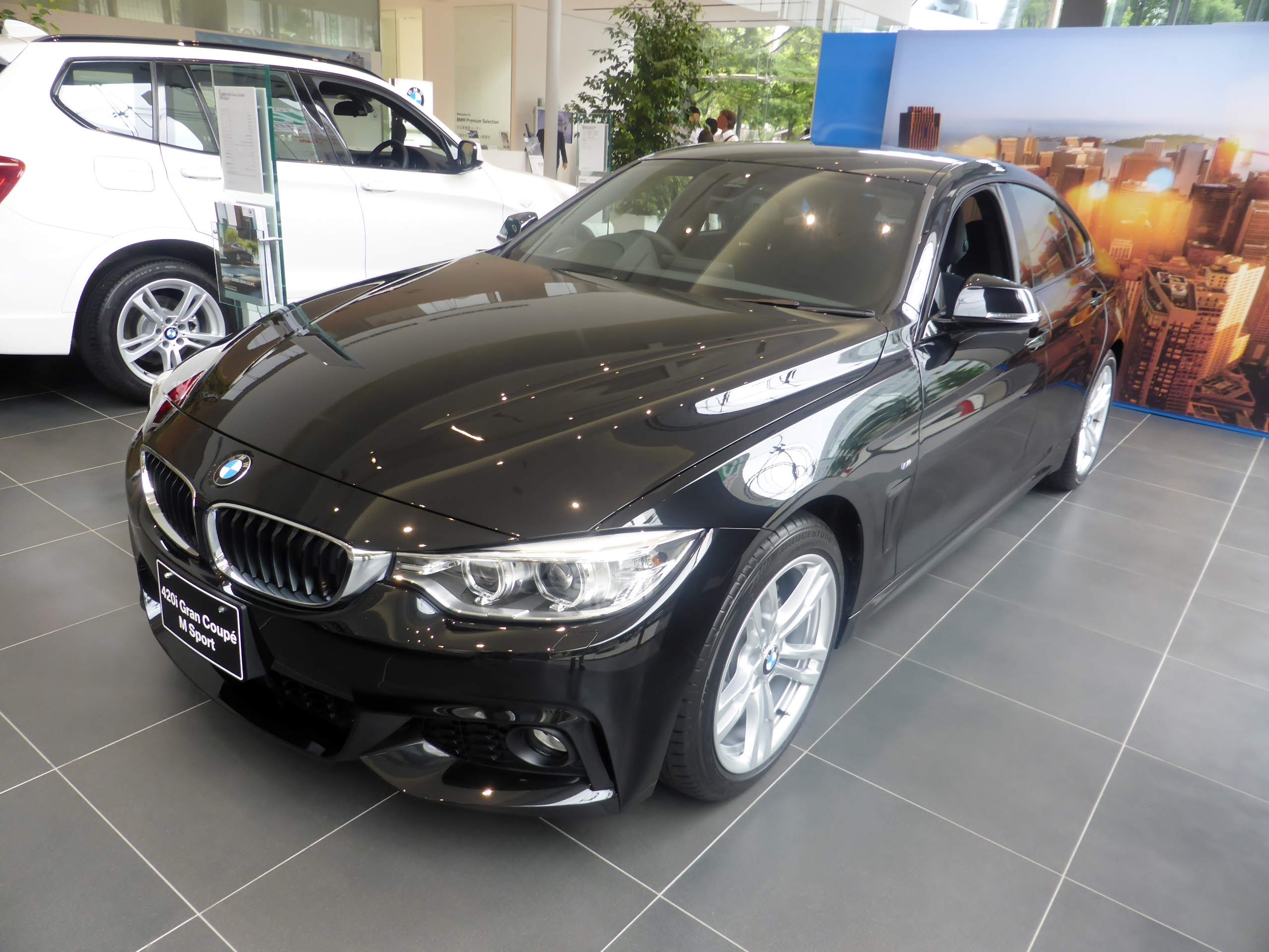 F36型BMW・420iグランクーペMスポーツをフロントから撮影。